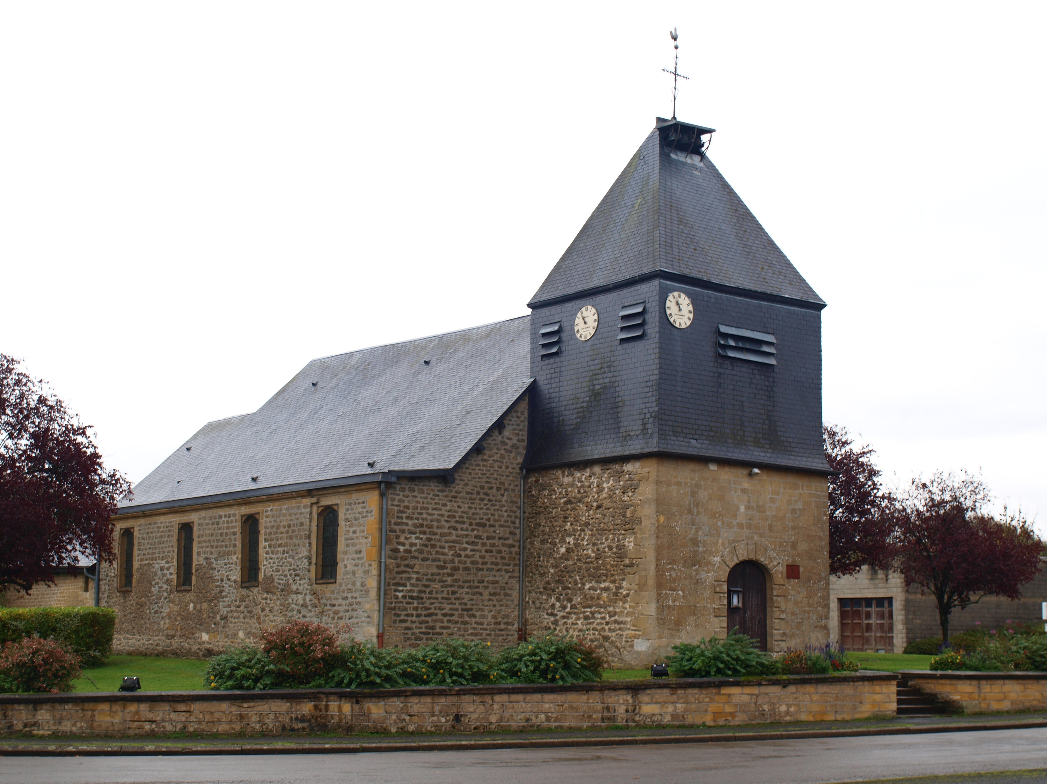 Sauville (Ardennes, France) ; église